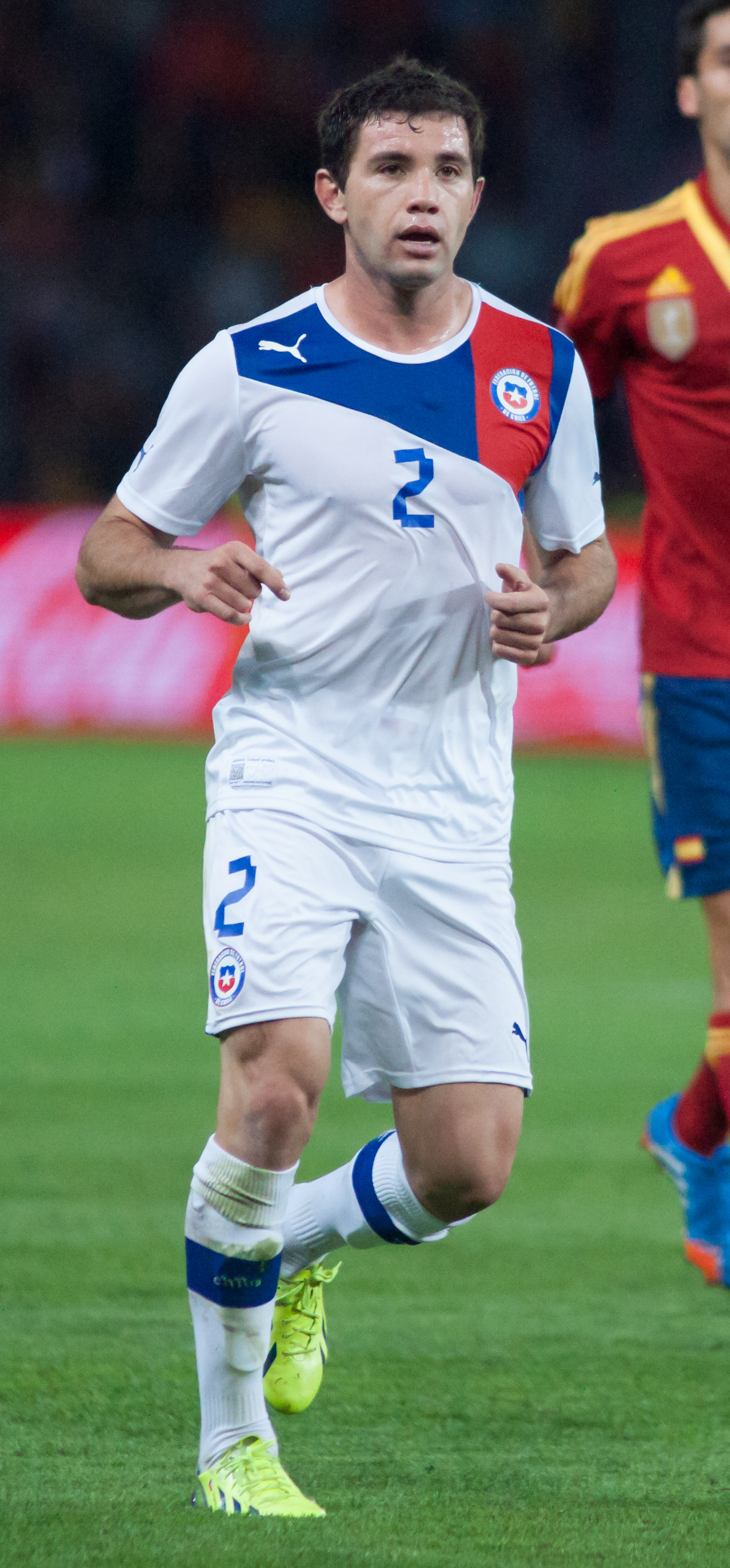 Espagne - Chili, 10 septembre 2013